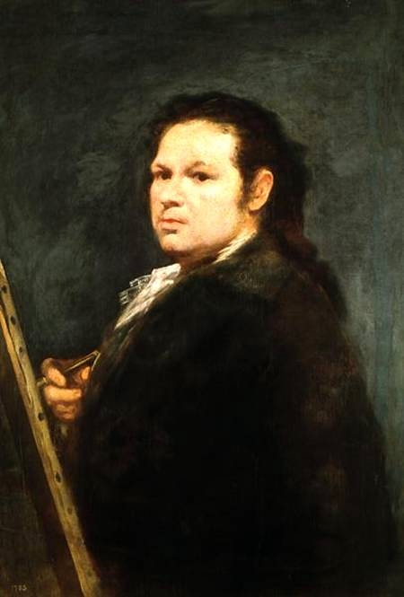 Autorretrato